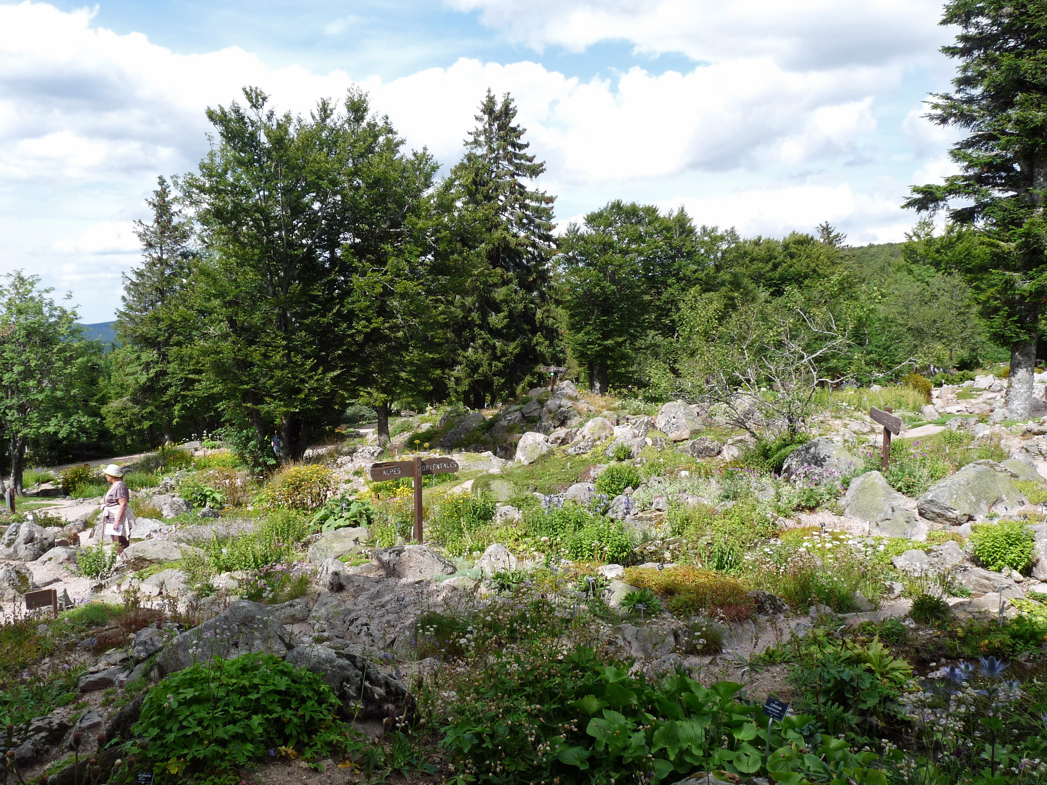 Flore des Alpes orientales au Jardin d'altitude du Haut-Chitelet (Vosges)